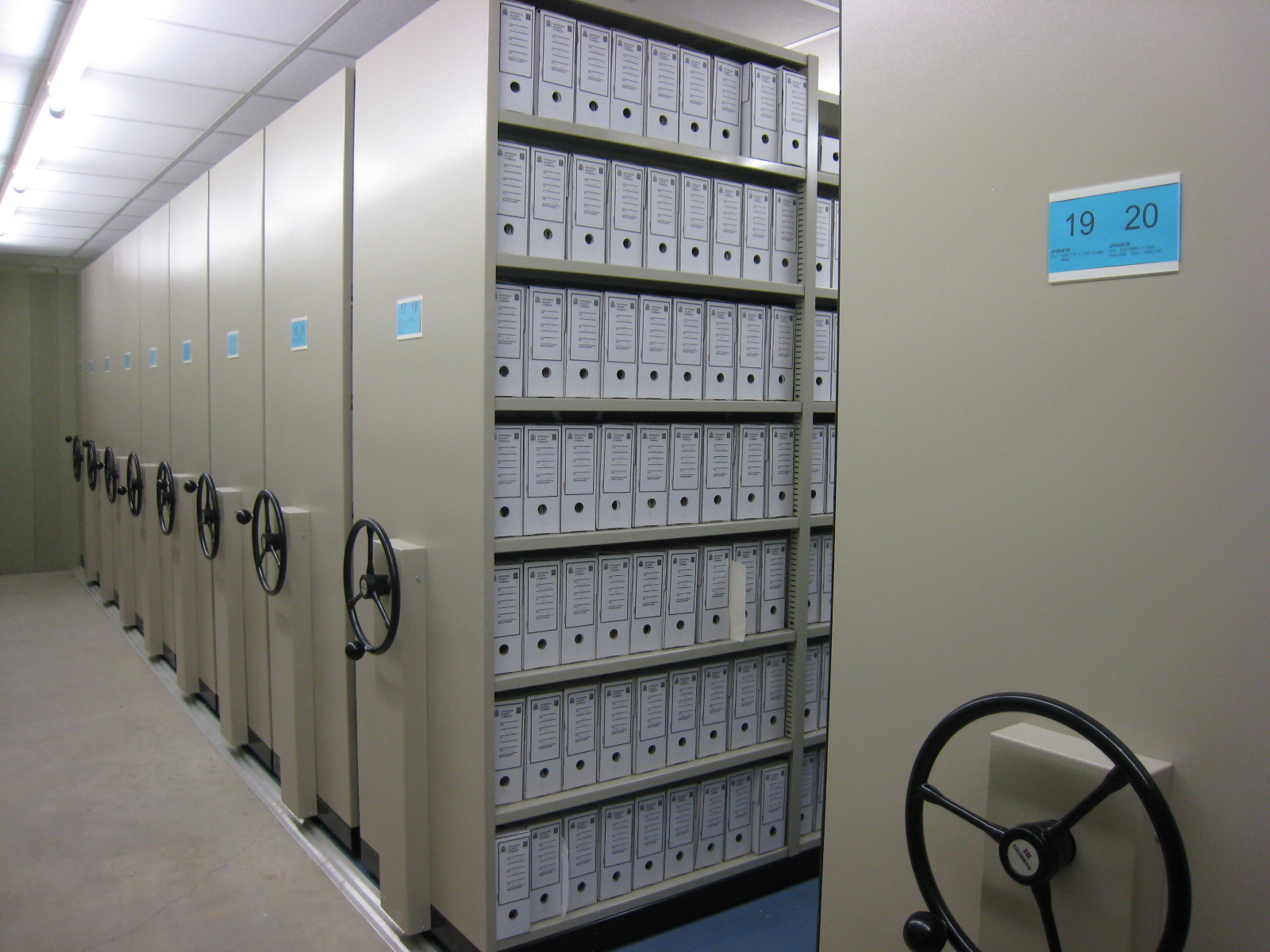 Dipòsit d’Arxiu dels Jutjats de Sant Boi de Llobregat (Xarxa d’Arxius Judicials de Catalunya)